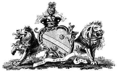 Armoiries de la famille Petre